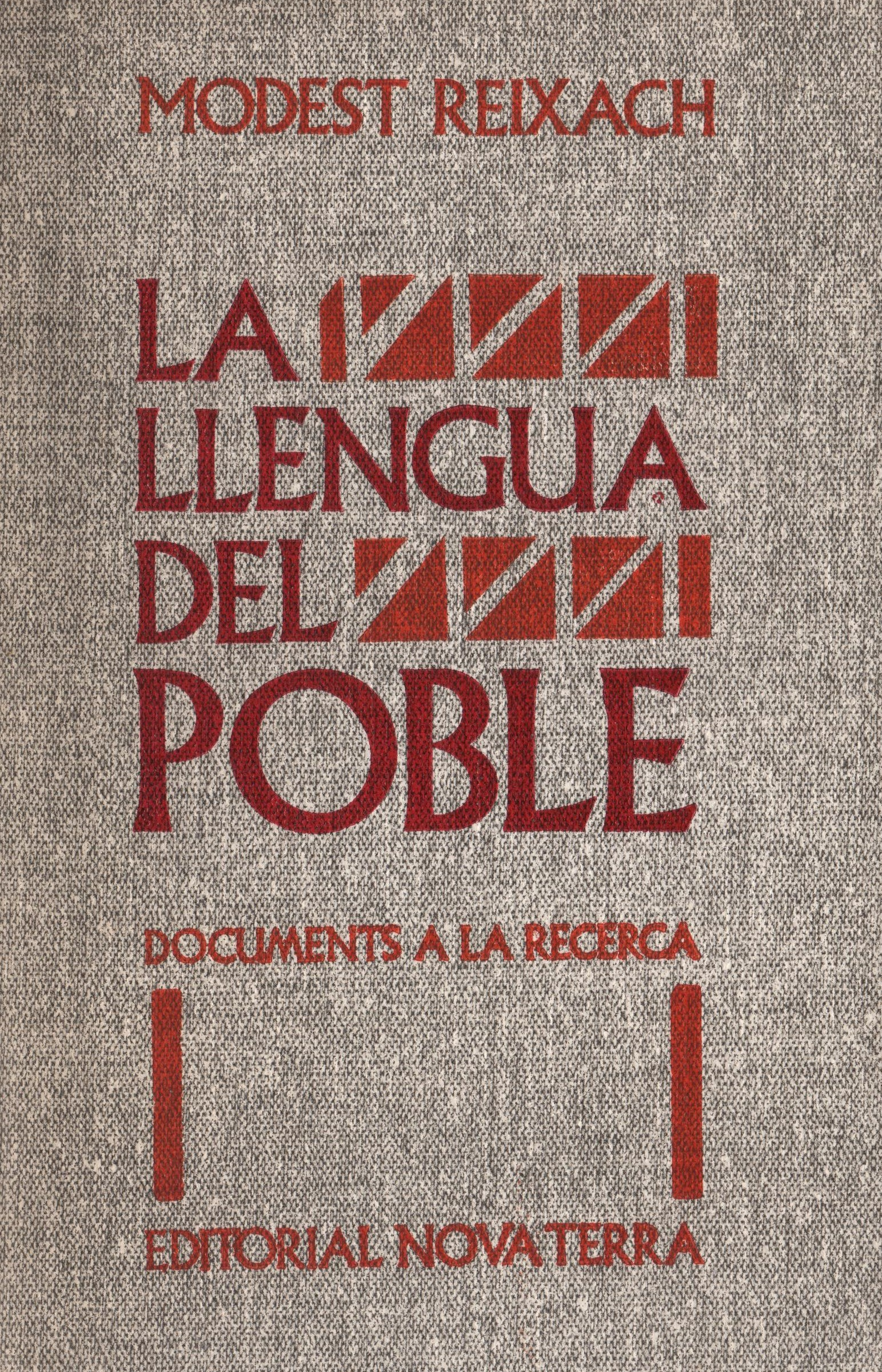 Coberta del llibre La llengua del poble, obra de Modest Reixach.Estudi pioner de la situació de la llengua catalana al final de la dicatura franquista.